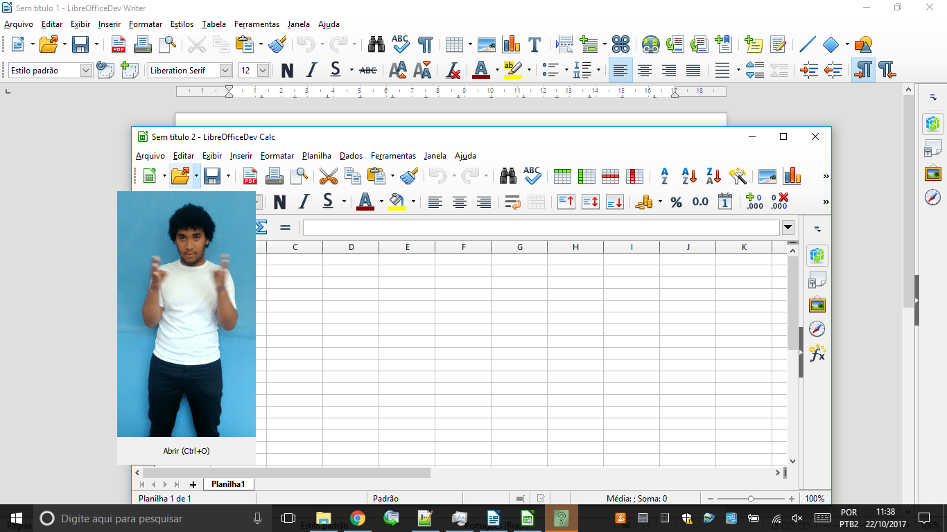 Primeira versão da interface do LIBRASOffice